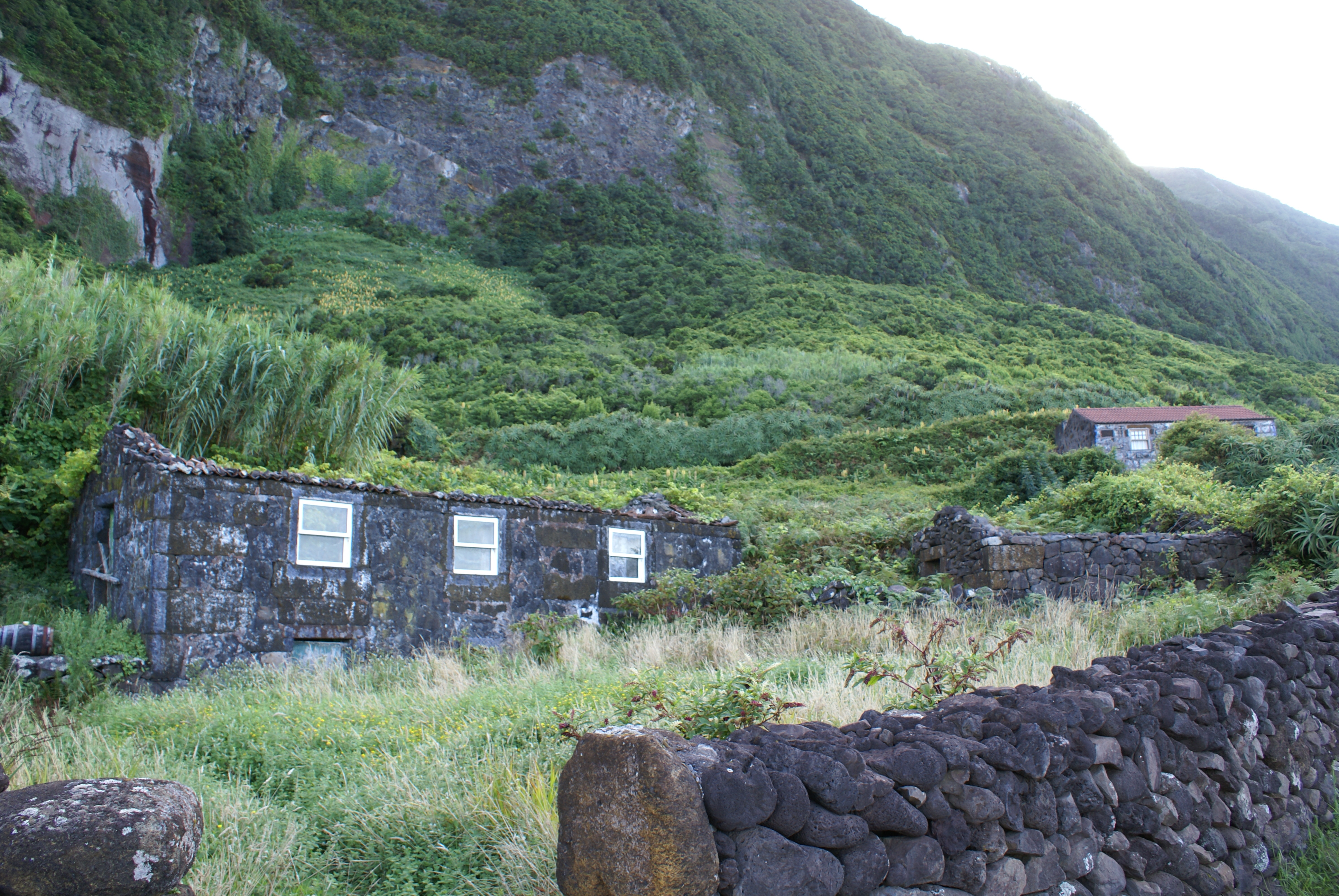 Fajã dos Tijolos, casa abandonada, aspecto das falésias, Calheta, ilha de São Jorge, Açores